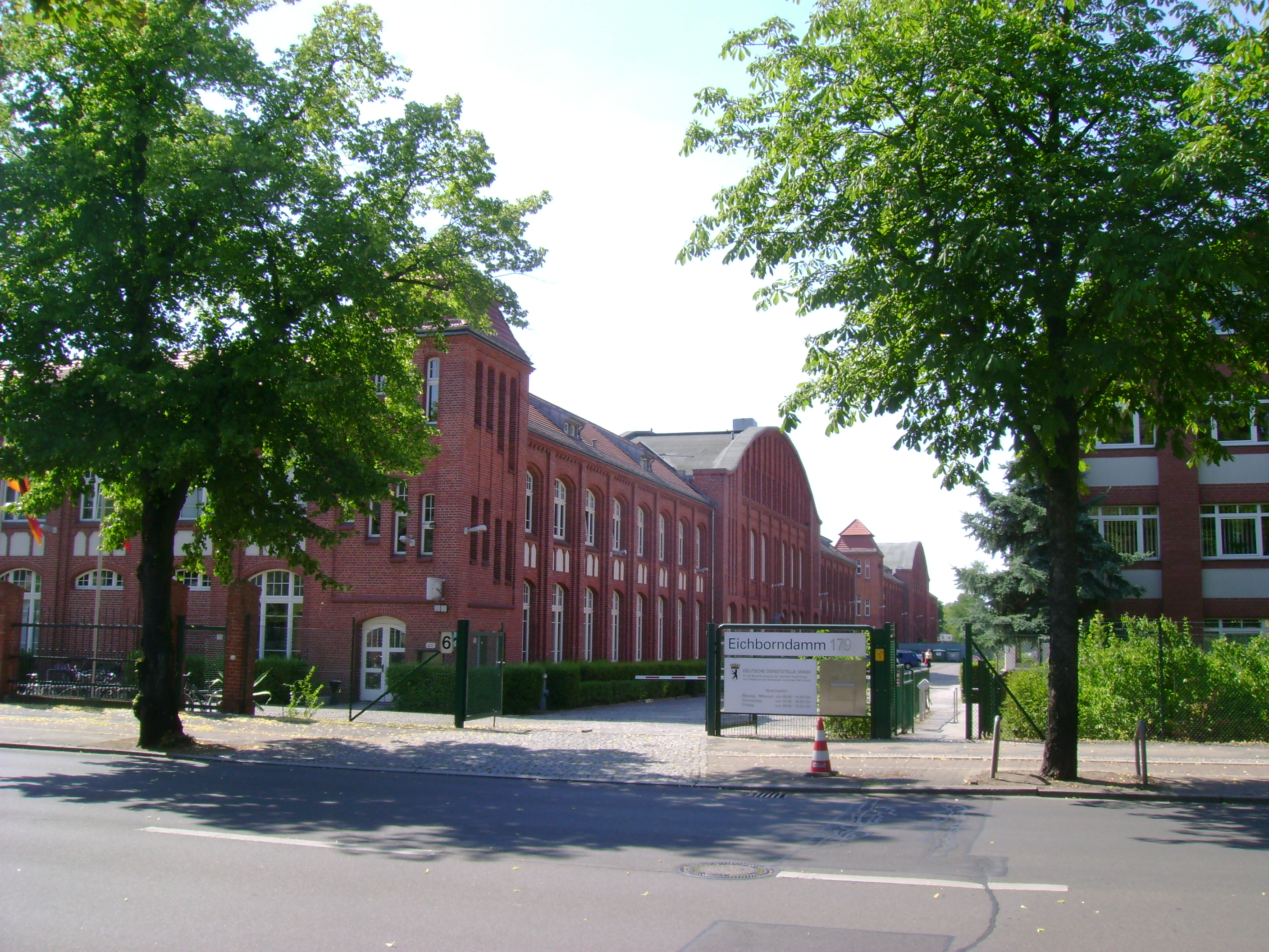 Haupteingang der Deutschen Dienststelle (WAST) in 13403 Berlin-Reinickendorf, Ortsteil Wittenau, Eichborndamm 179